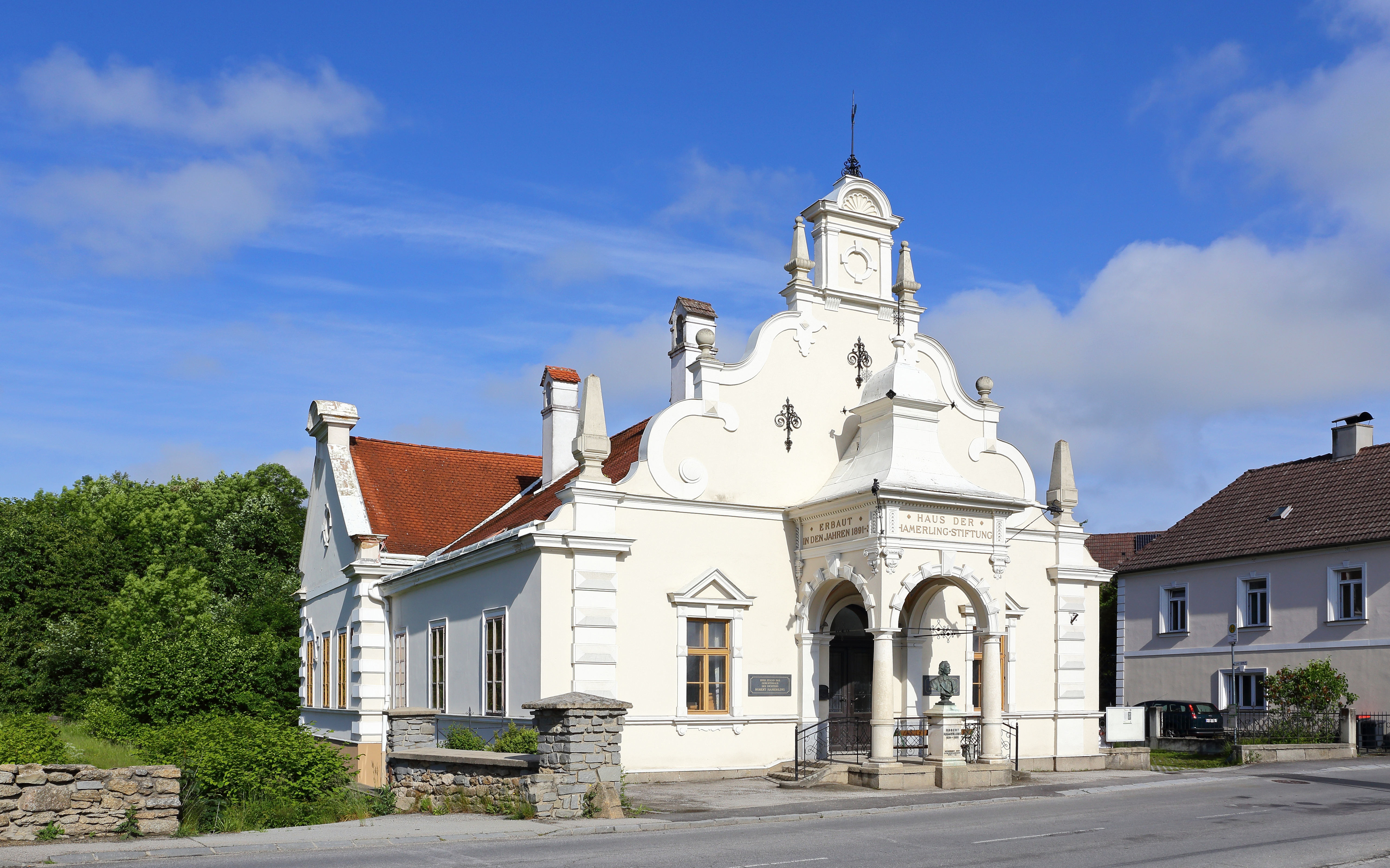 Das von 1891 bis 1893 an Stelle des Geburtshauses von Robert Hamerling erbaute Haus ist im Stil der Neorenaissance gehalten und diente bis 2010 als Rathaus von Kirchberg am Walde.